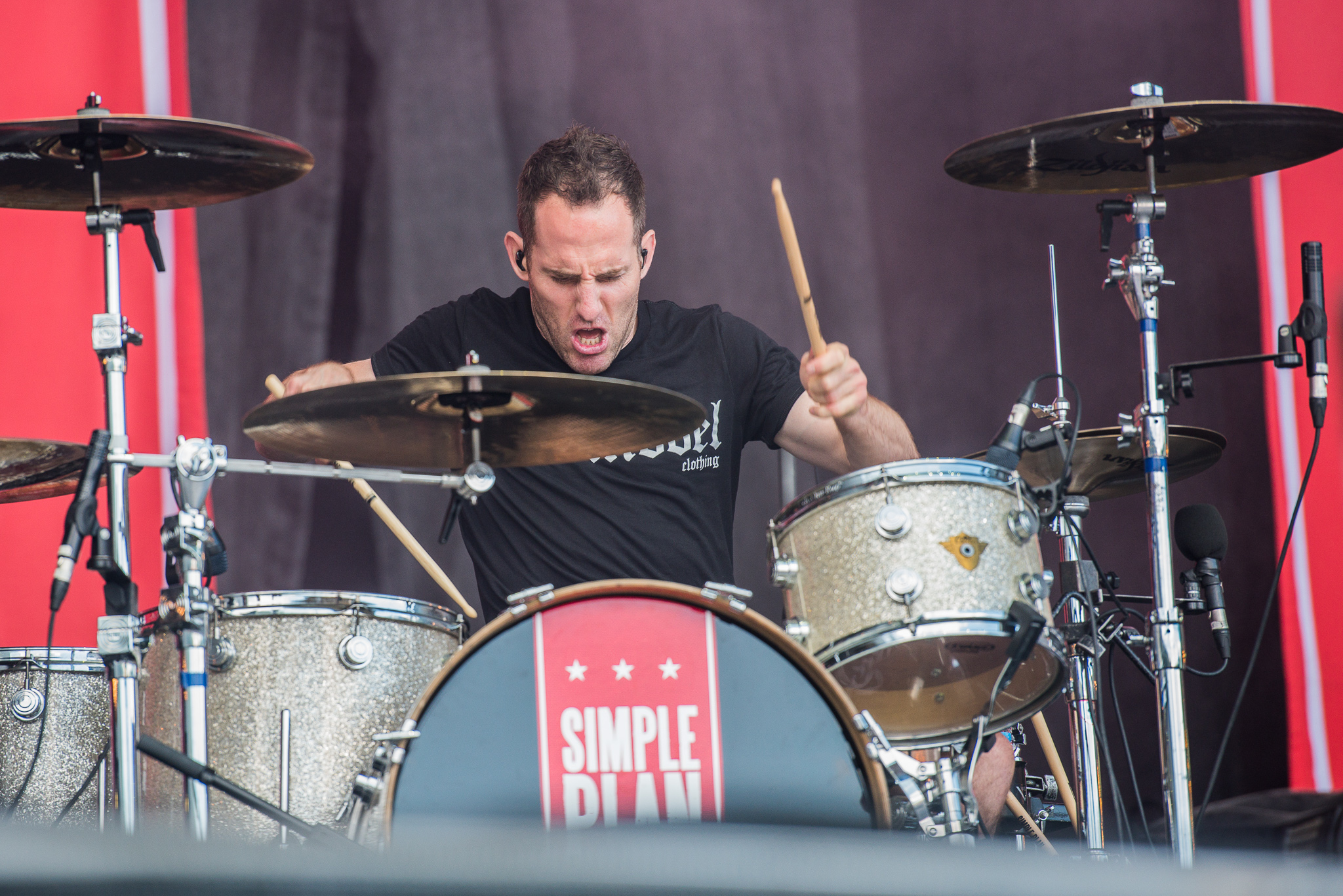 ARGO-Konzerte,Beck's Park Stage,Chuck Comeau,Konzert,Livekonzert,Livemusik,Musik,RiP,Rock im Park 2017,Simple Plan